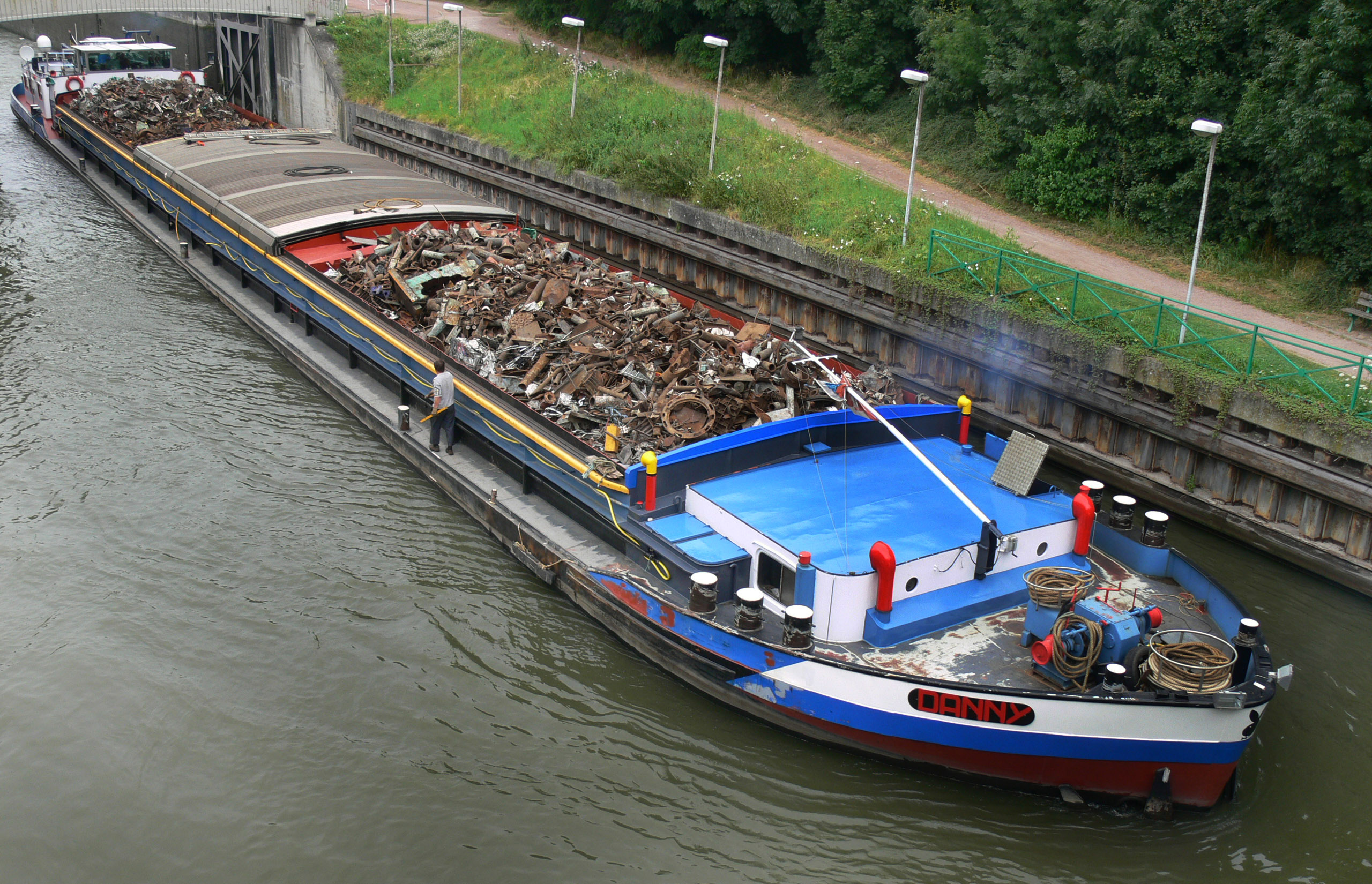 Transport par péniche de métaux pour leur recyclage (ici sur la Deûle canalisée (dans l'écluse du Grand carré, à Lambersart).. voyage de France, à partir de Lille, vers la Belgique).